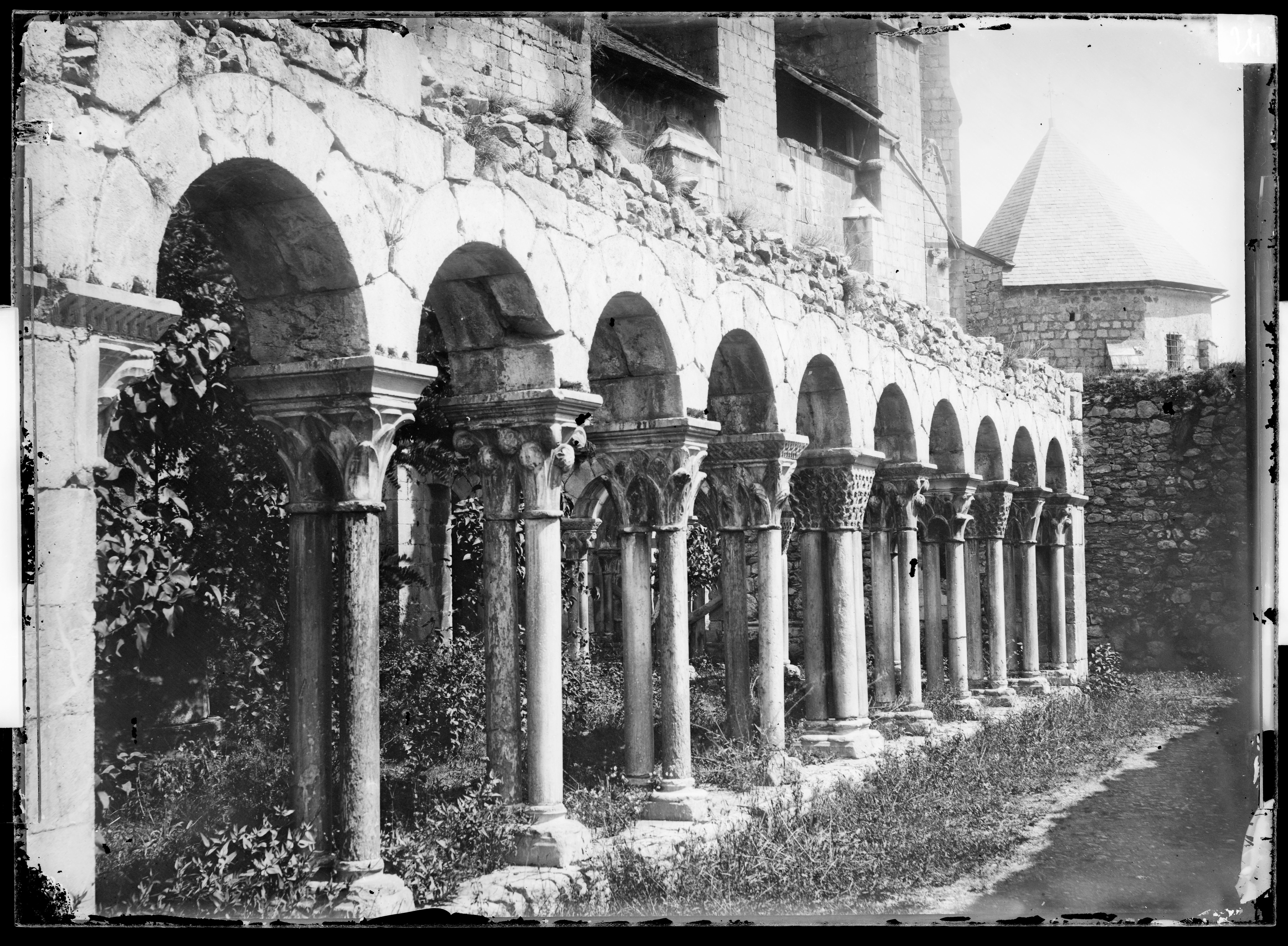 plaque négative au collodion format 13x18 cm inscription manuscrite sur enveloppe : "Cloître de St Bertrand de Comminges "